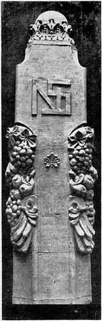 Detail cinema / bioscoop Schinkel, Purmerend, the Netherlands / Nederland (sculptor / beeldhouwer Willem Brouwer, 1912). c 1914. Photo. From / afkomstig uit Bouwkundig Weekblad, 34e jaargang, nummer 6 (7 februari 1914): p. 66.